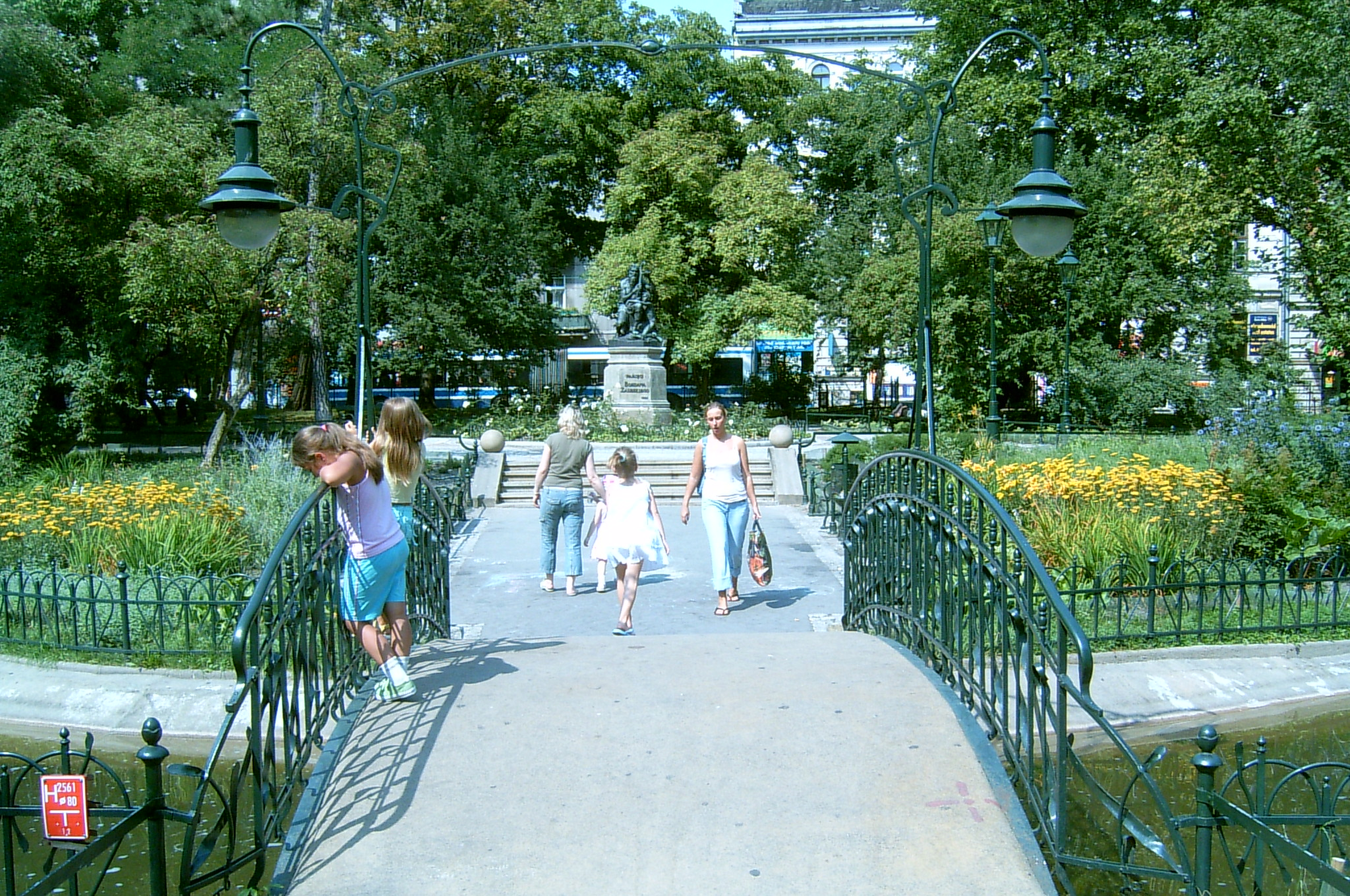 旧市街緑地帯.